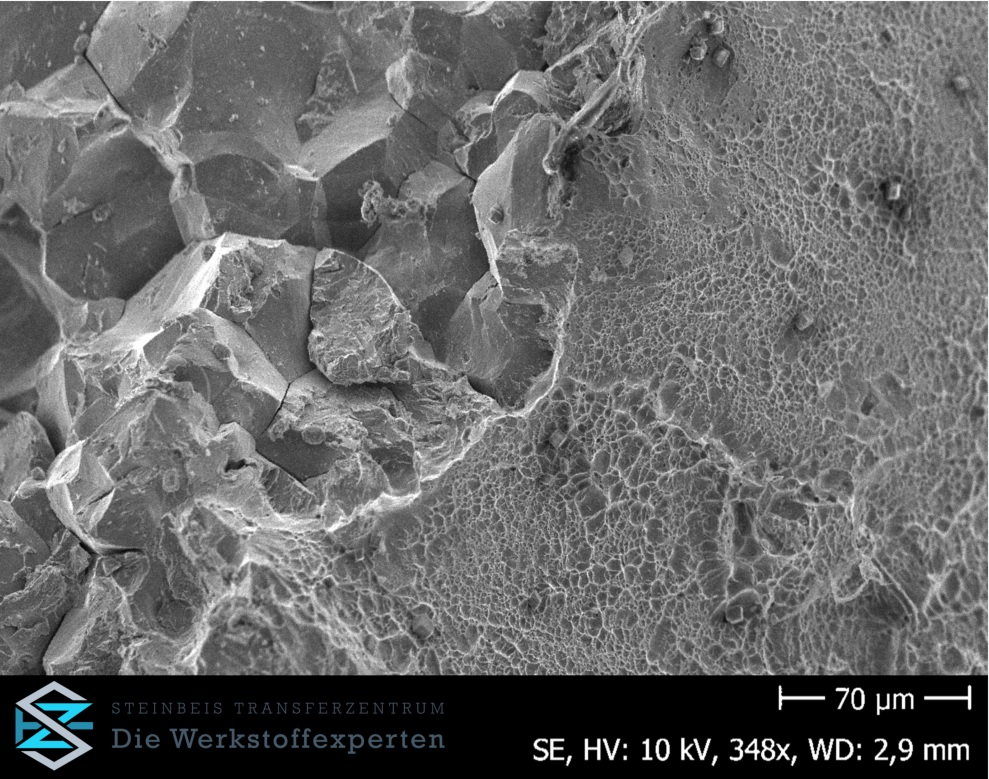 Rasterelektronenmikroskopische Aufnahme eines wasserstoffbedingten Schadens an einem ultrahochfestem Stahl mit der Werkstoffnummer 1.4614, mit versprödeten und duktilen/nicht versprödeten Bruchanteilen